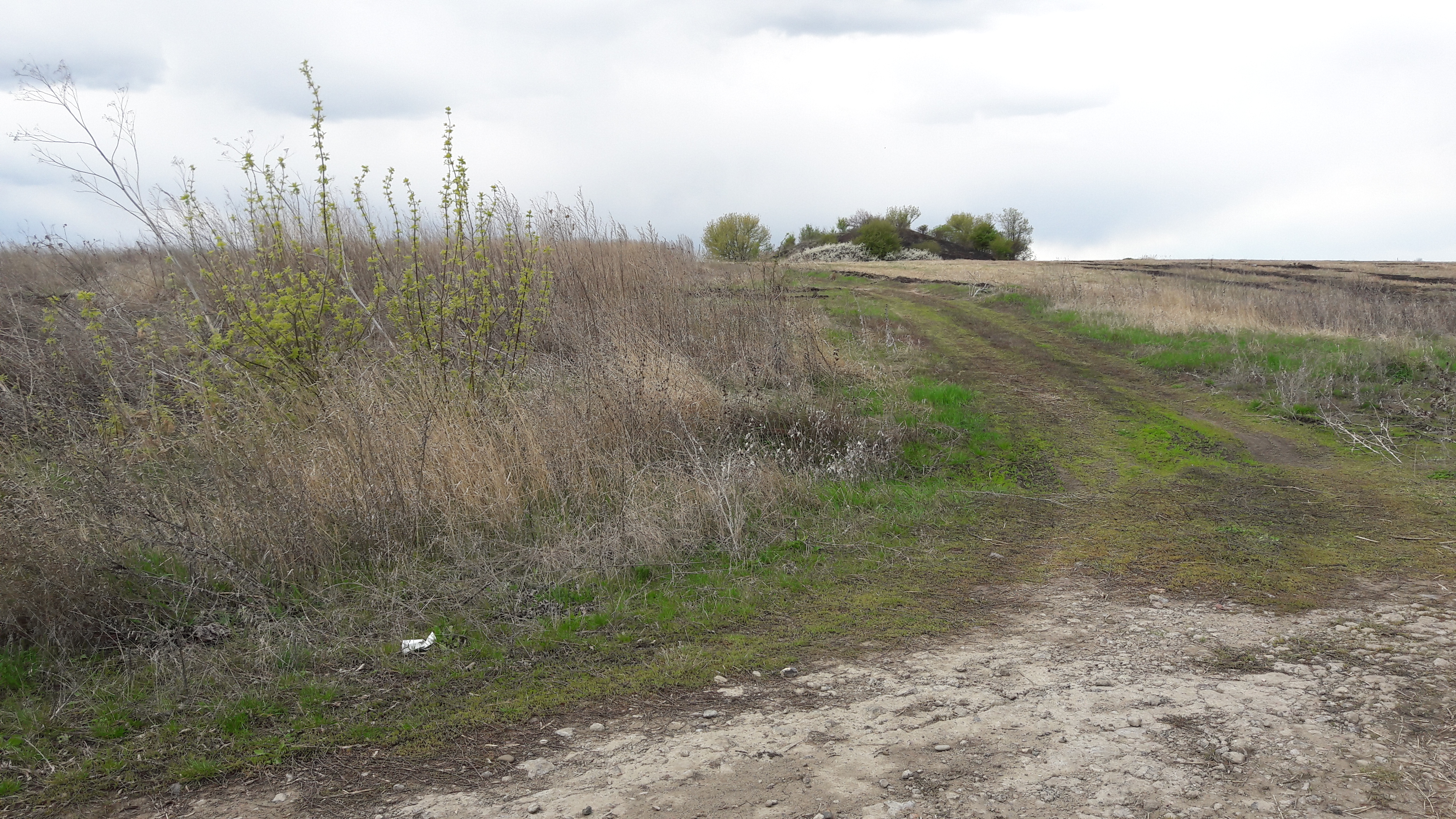 Point culminant de la Transnistrie _ La butte sommitale vue depuis la route forestière